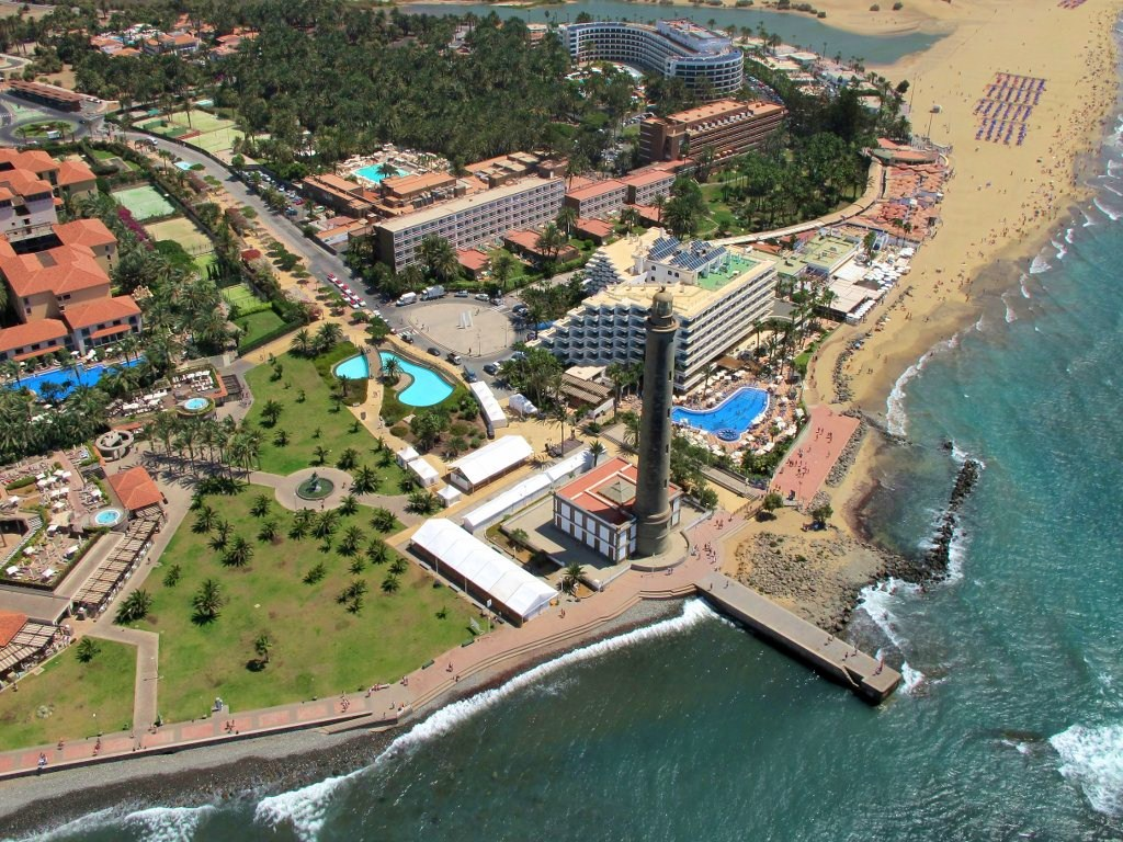 La Costa de San Bartolomé de Tirajana es eminentemente turística (comprendiendo los espacios turísticos de San Agustín, Playa del Inglés, Maspalomas, y la más reciente de Meloneras). La "capital" oficial del municipio de halla en las montañas (el hoy pequeño pueblo de Tunte o "San Bartolomé de Tirajana").